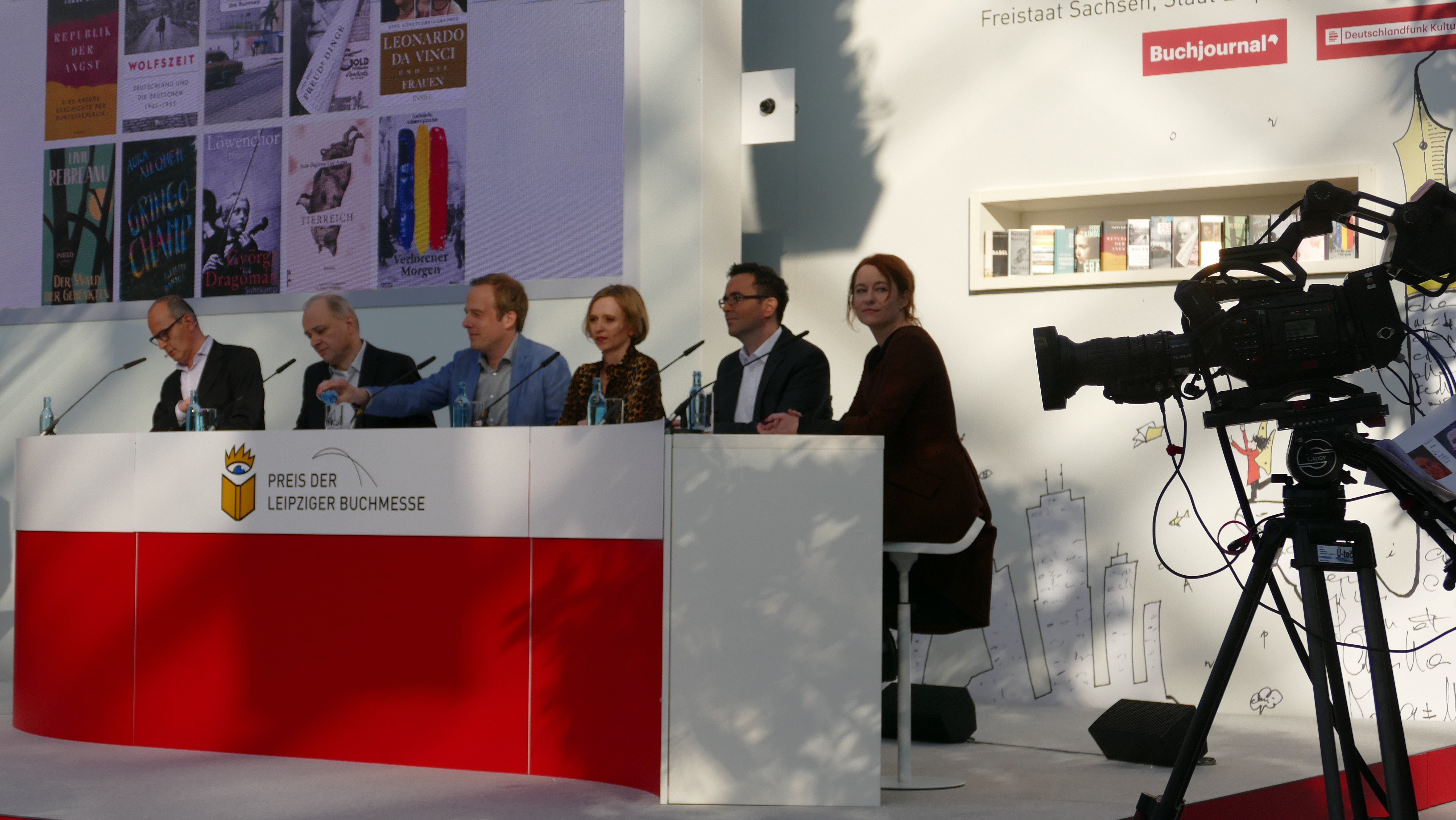 Preis der Leipziger Buchmesse - Die Jury 2019: Vor links: Juryvorsitzender Jens Bisky, Gregor Dotzauer, Tobias Lehmkuhl, Wiebke Porombka, Marc Reichwein, Katrin Schumacher. (Jurymitglied Elke Schmitter ist verhindert).